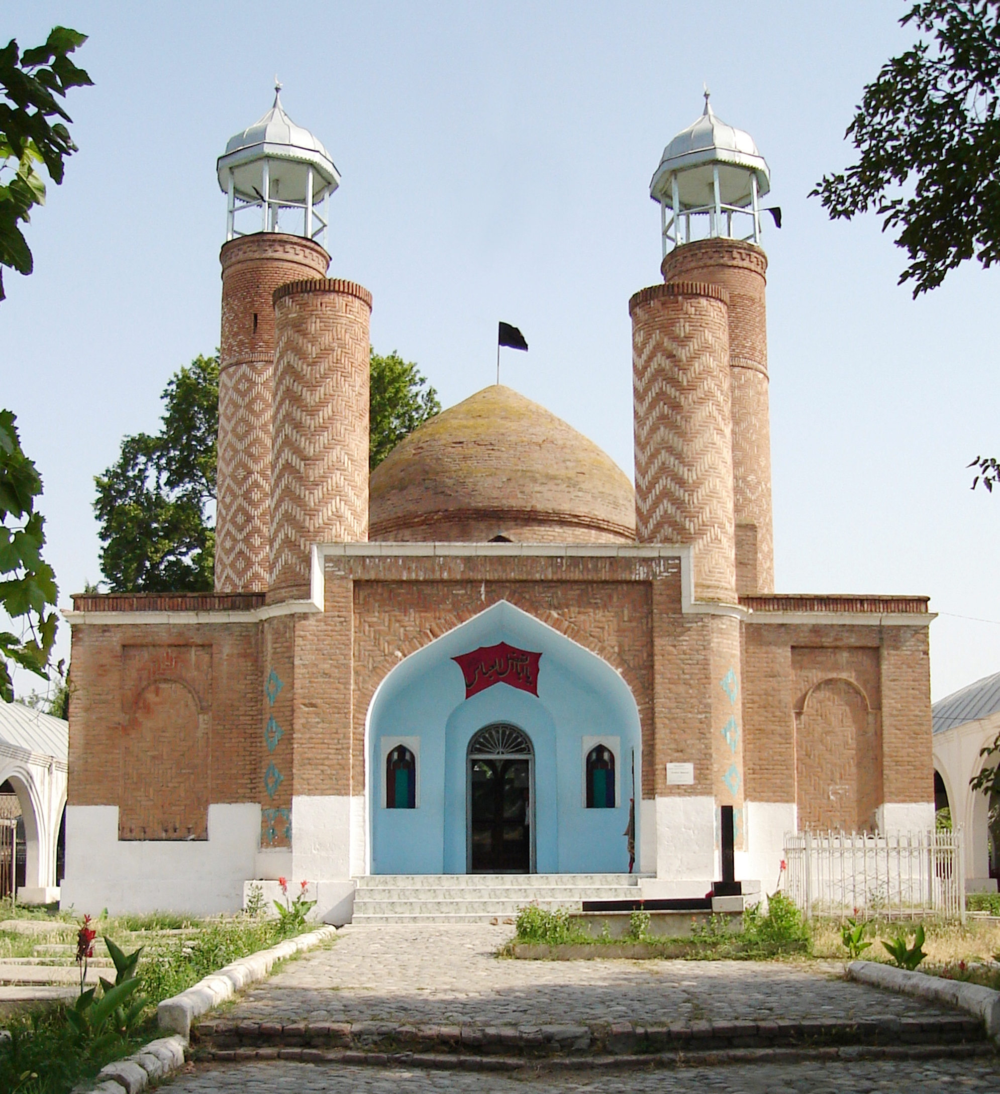 Bərdə İmamzadə - Bərdə şəhərində yerləşən İmamzadə (XIV əsr)